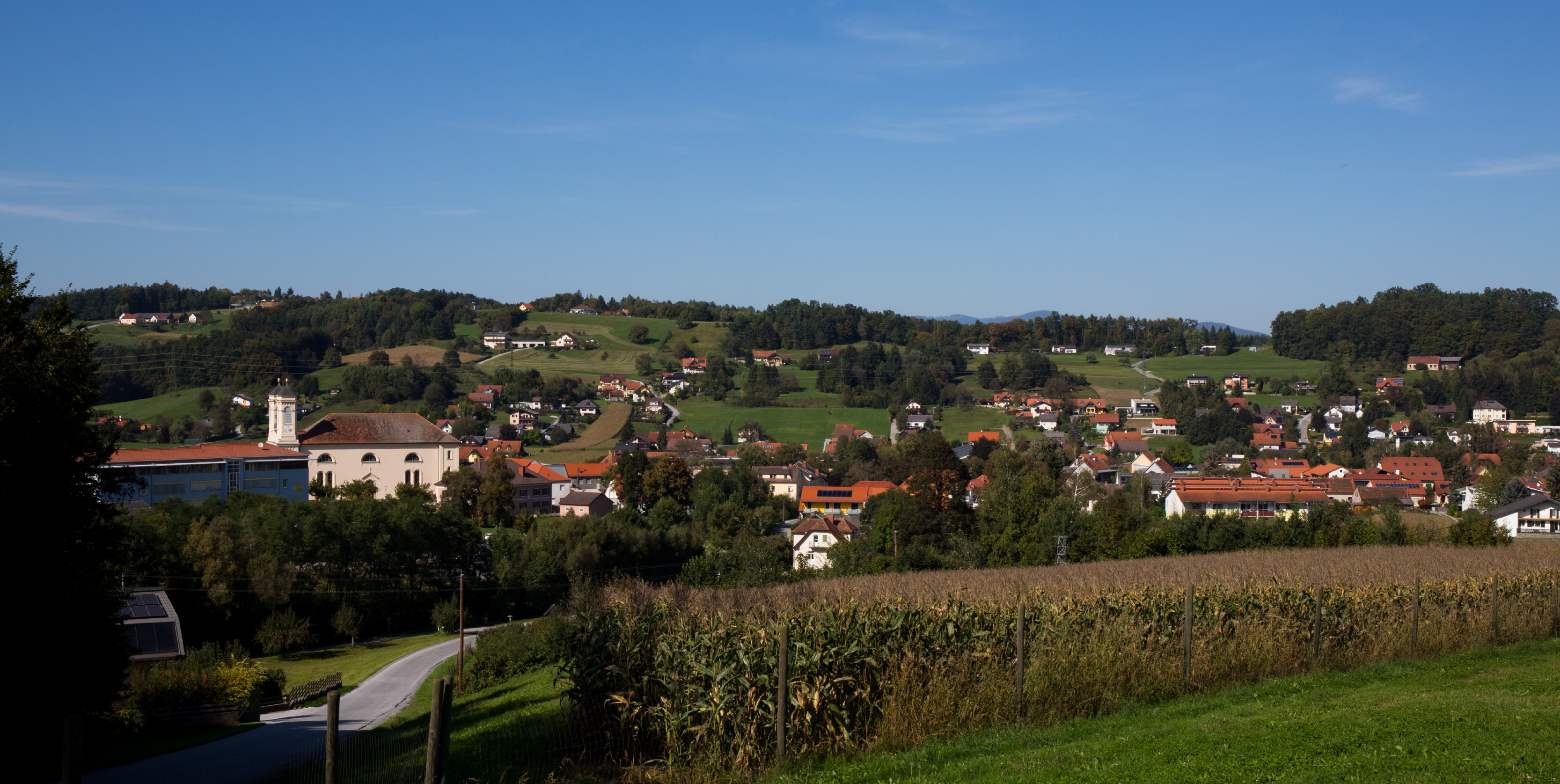 Eggersdorf bei Graz, Austria